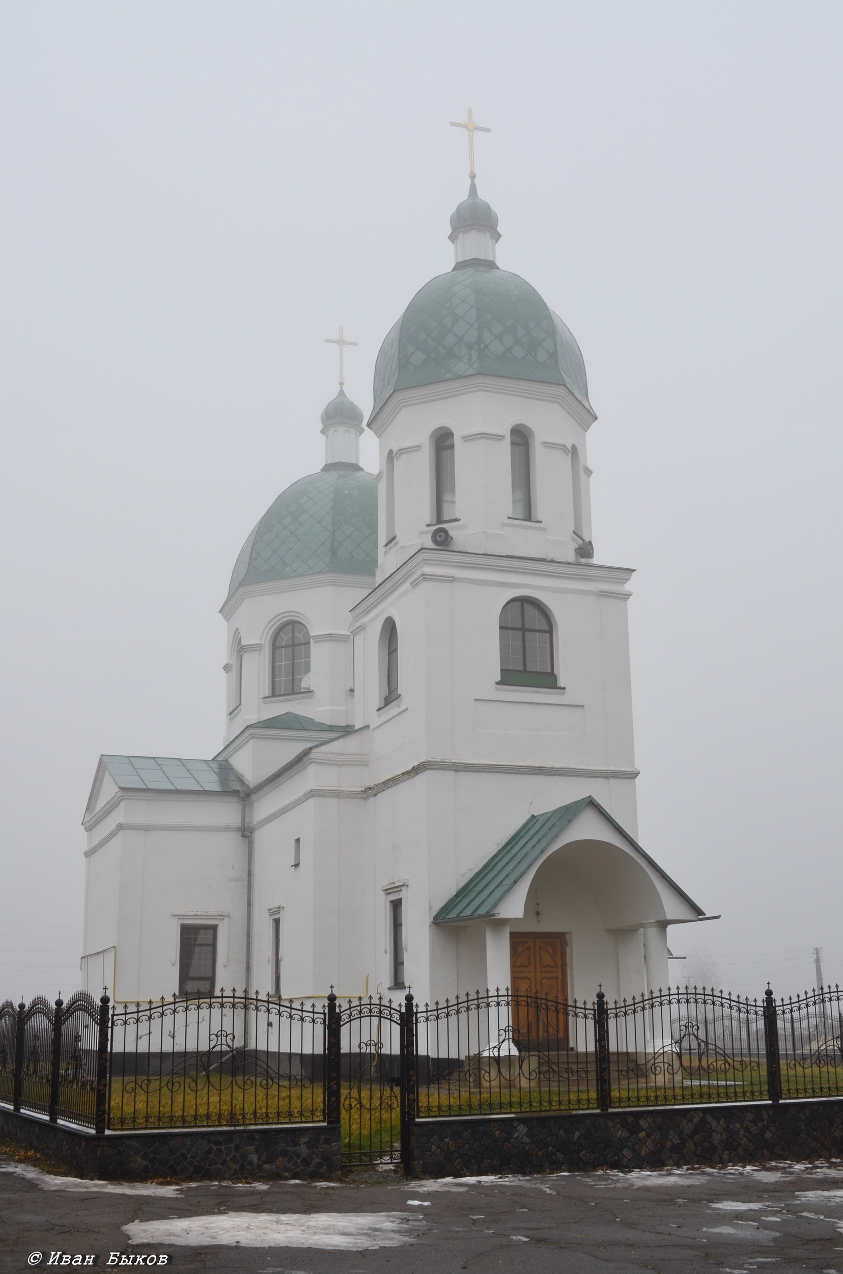 Церква Різдва Богородиці (мур.), село Ківшовата. Нещодавно церква була відреставрована.